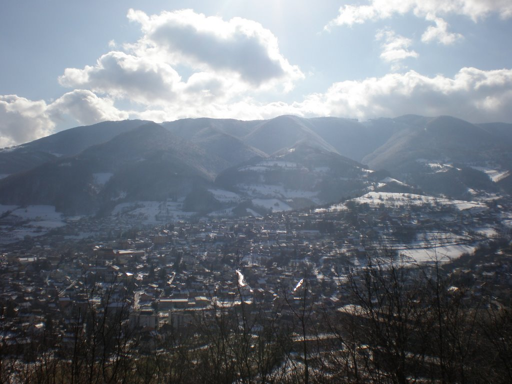 Pogled na Mrkonjić Grad iz pravca repetitora.